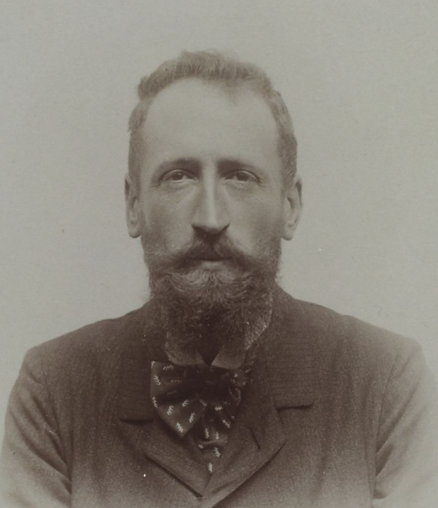 [Collection Jules Beau. Photographie sportive] : T. 26. Année 1904 / Jules Beau : F. 50. Le Blon ; Béconnais